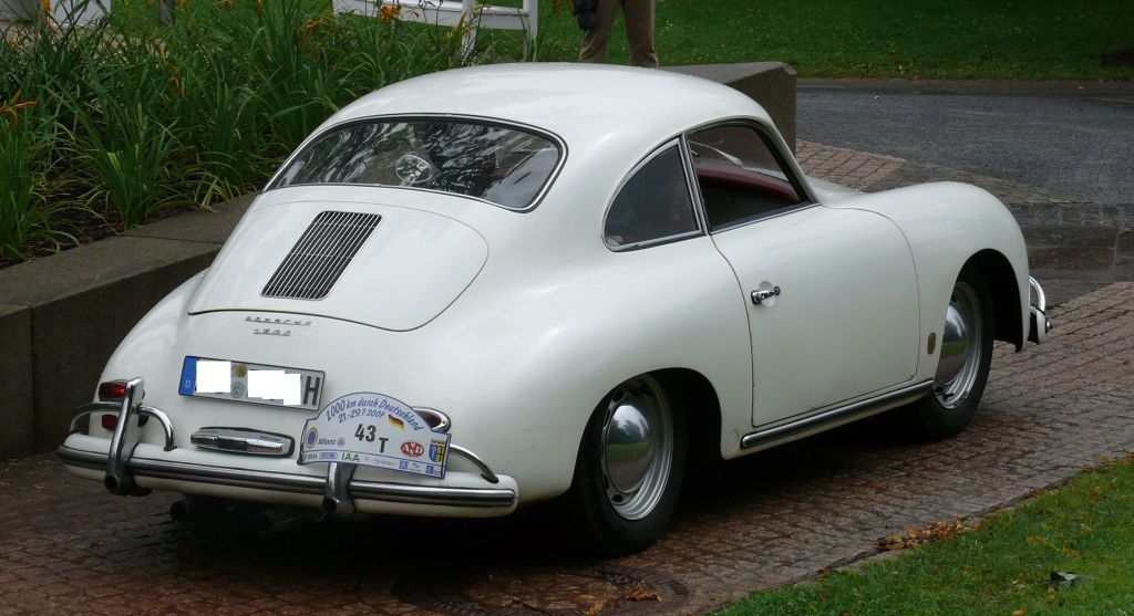 Porsche 356 1600